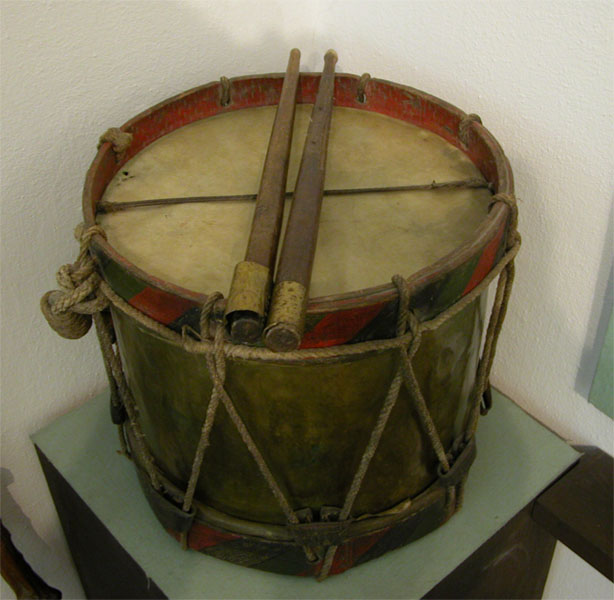 1848-as menetdob a soproni Storno-házból korabeli dobverővel